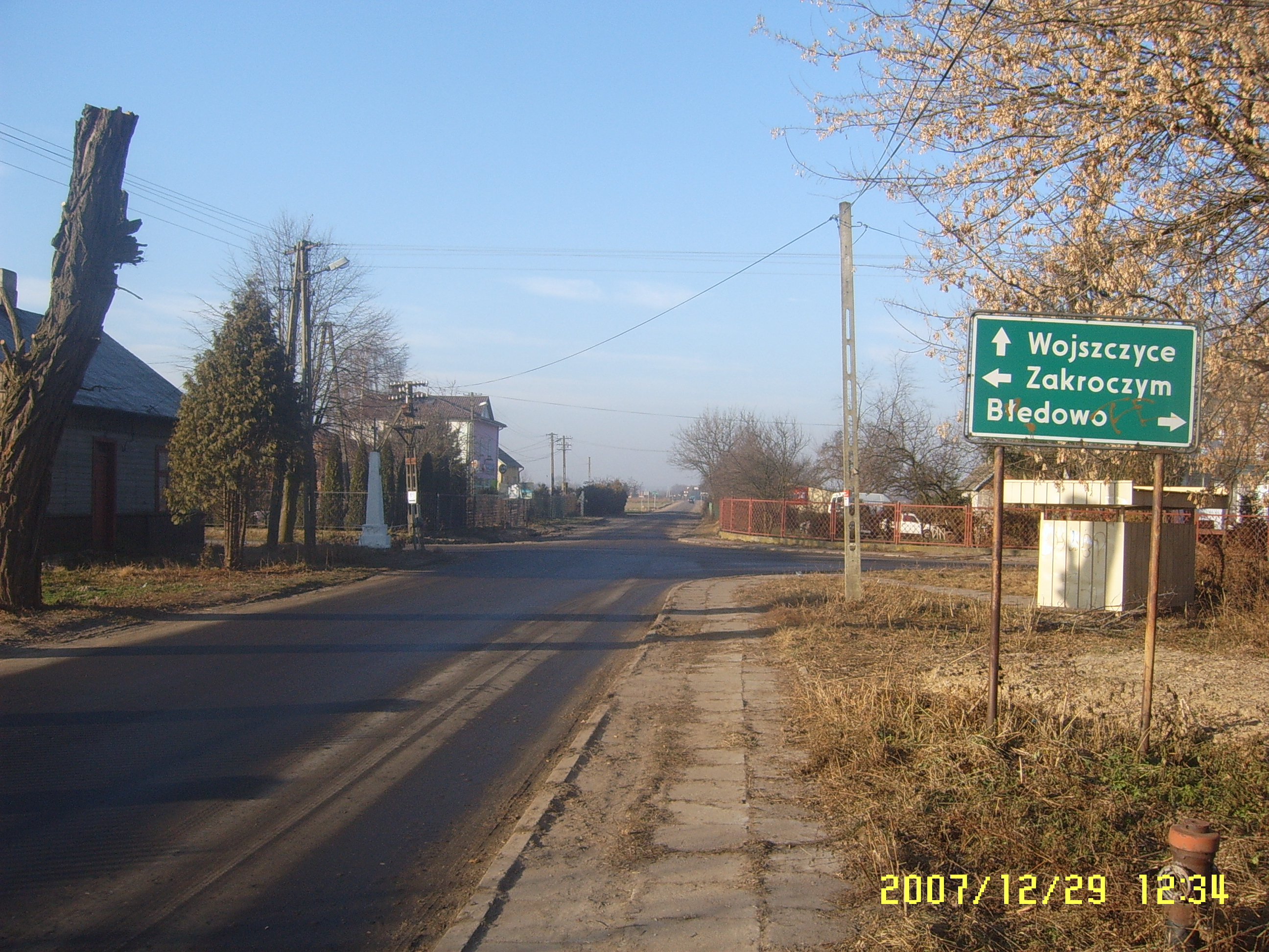 Skrzyżowanie w Janowie